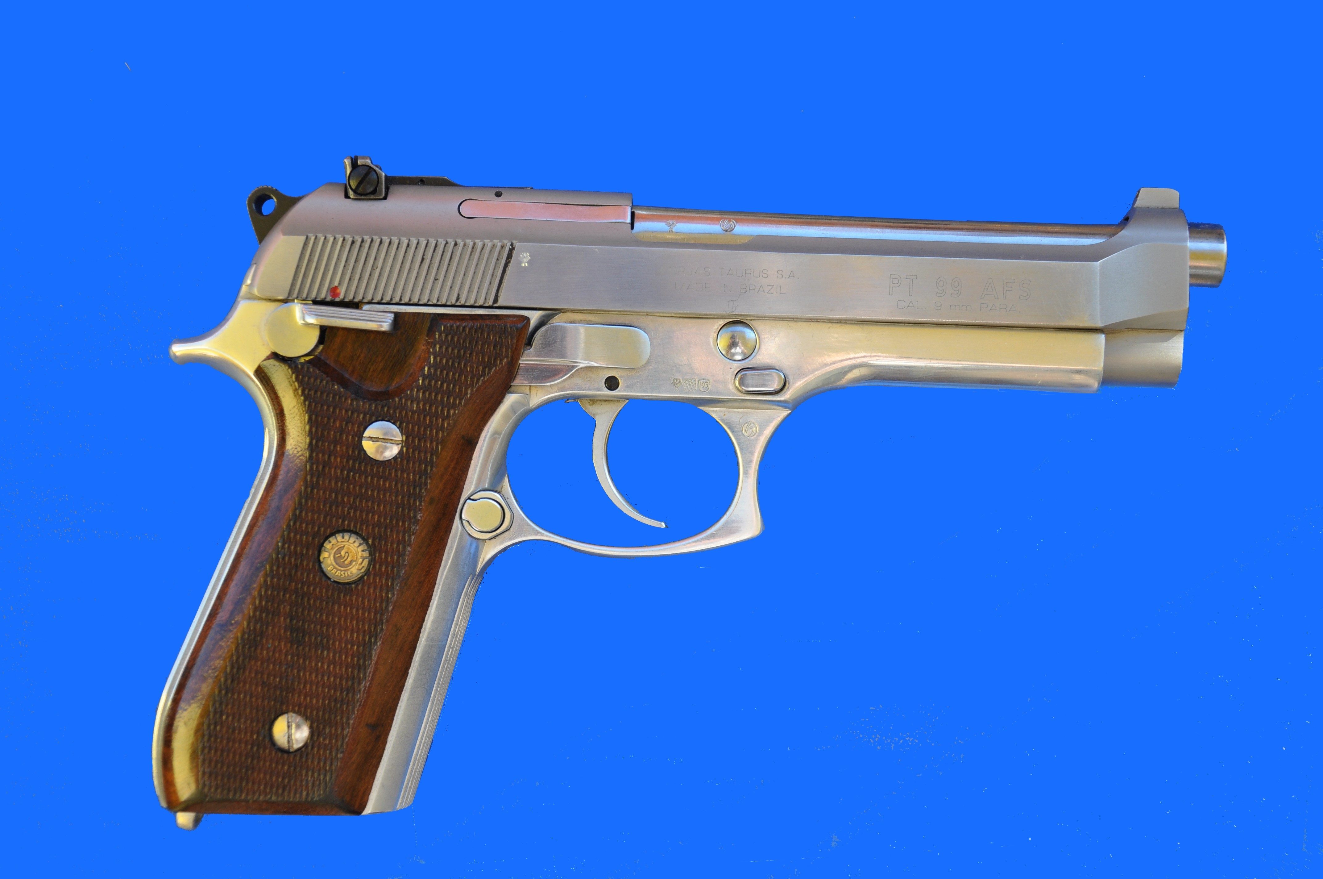 Raurus PT 99 ASF